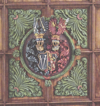 Kirche Hl. Dreifalötigkeit in Rohrbach, Ehewappen des Johann Daniel Sauerzapf und seiner Germahlin Elisabeth Stettner von Grabenhof